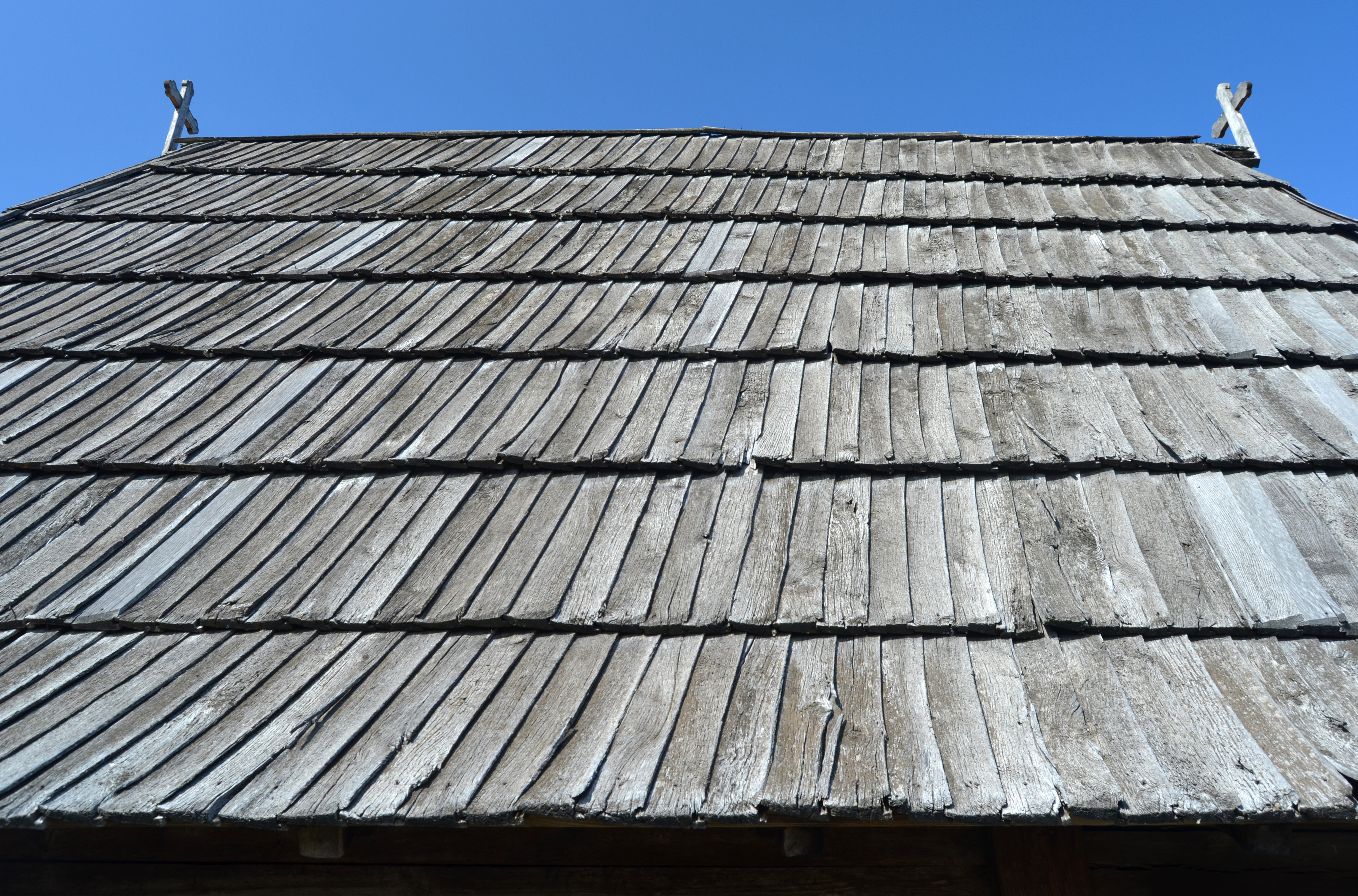 Снимак из 2012.